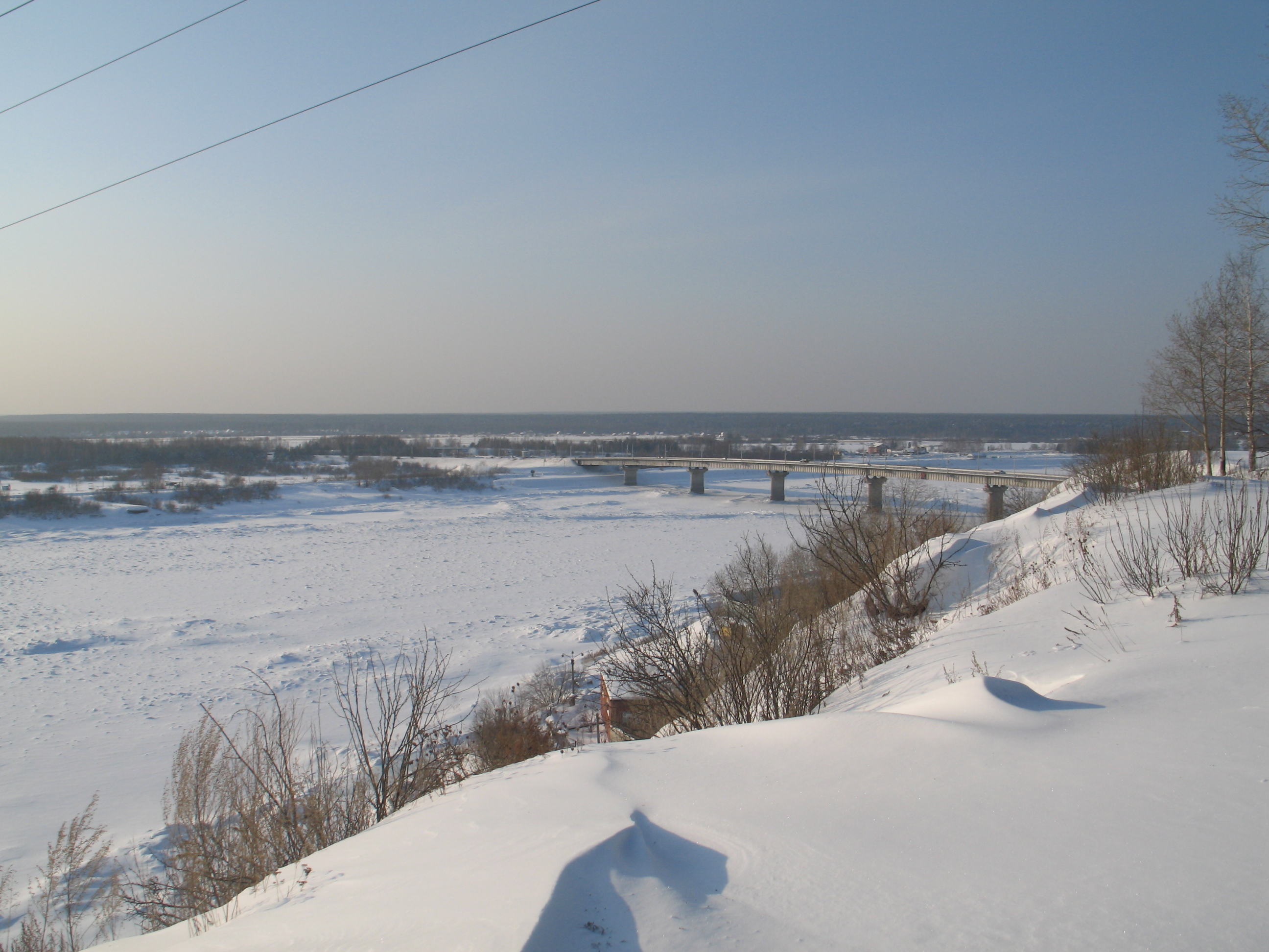 Tom river, view from Lagerny garden, Tomsk, Russia. Вид на Томь с Лагерного сада, Томск